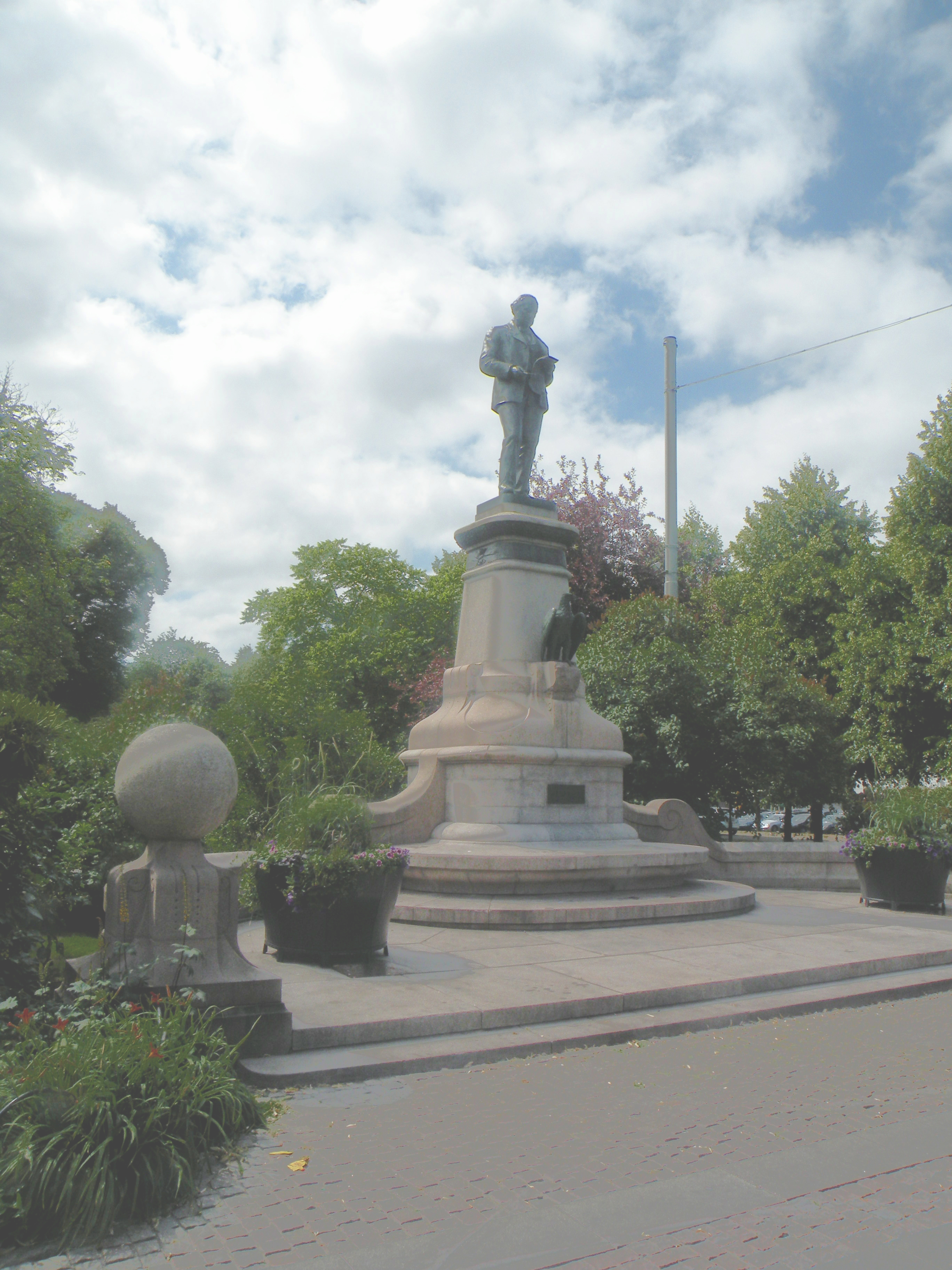 Памятник Эриксону